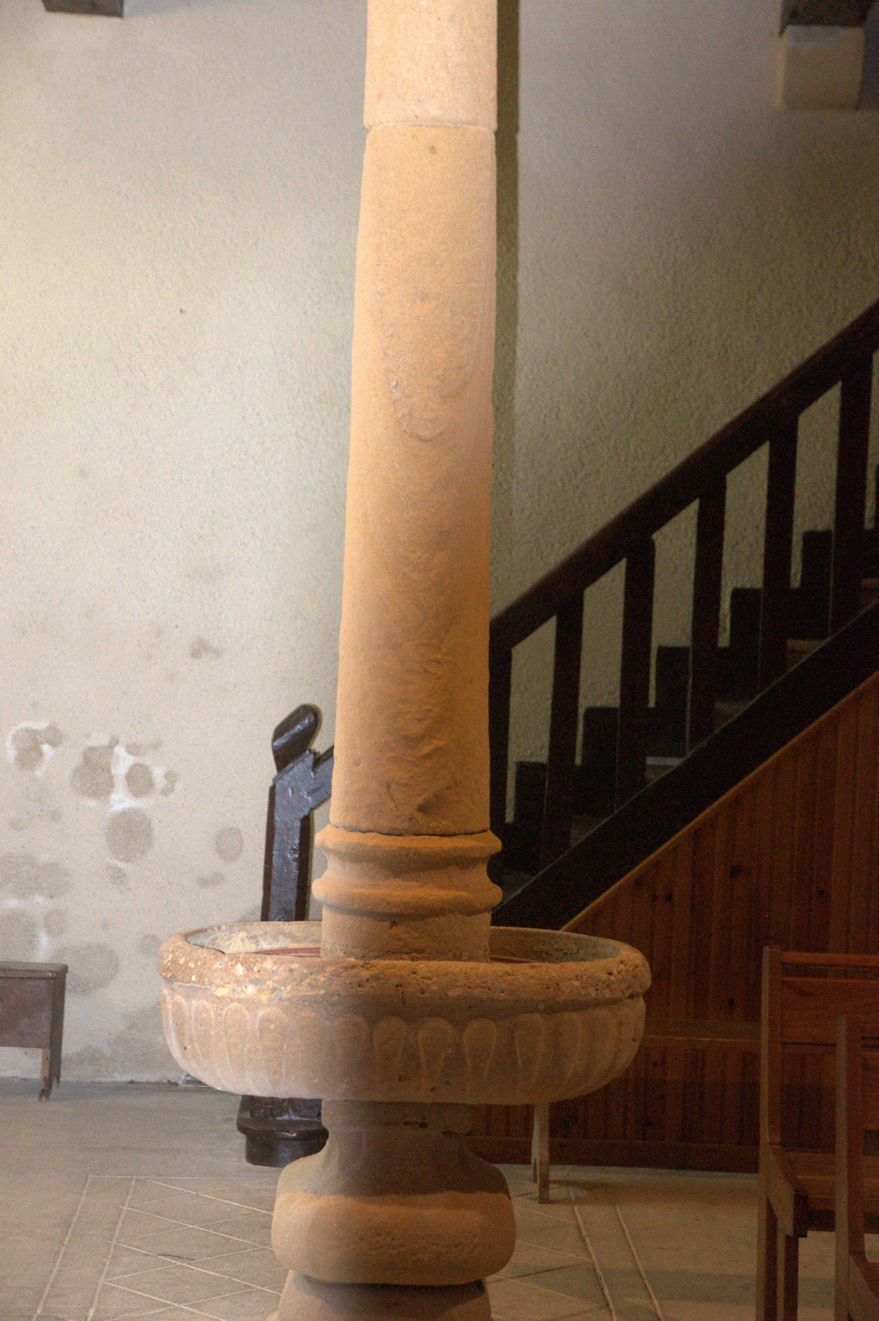 Bénitier - Église de Mascaraàs (Béarn)